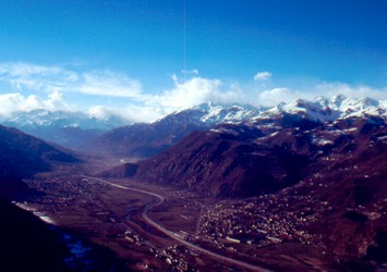 La Val di Susa si trova nella parte occidentale del Piemonte, ad ovest di Torino